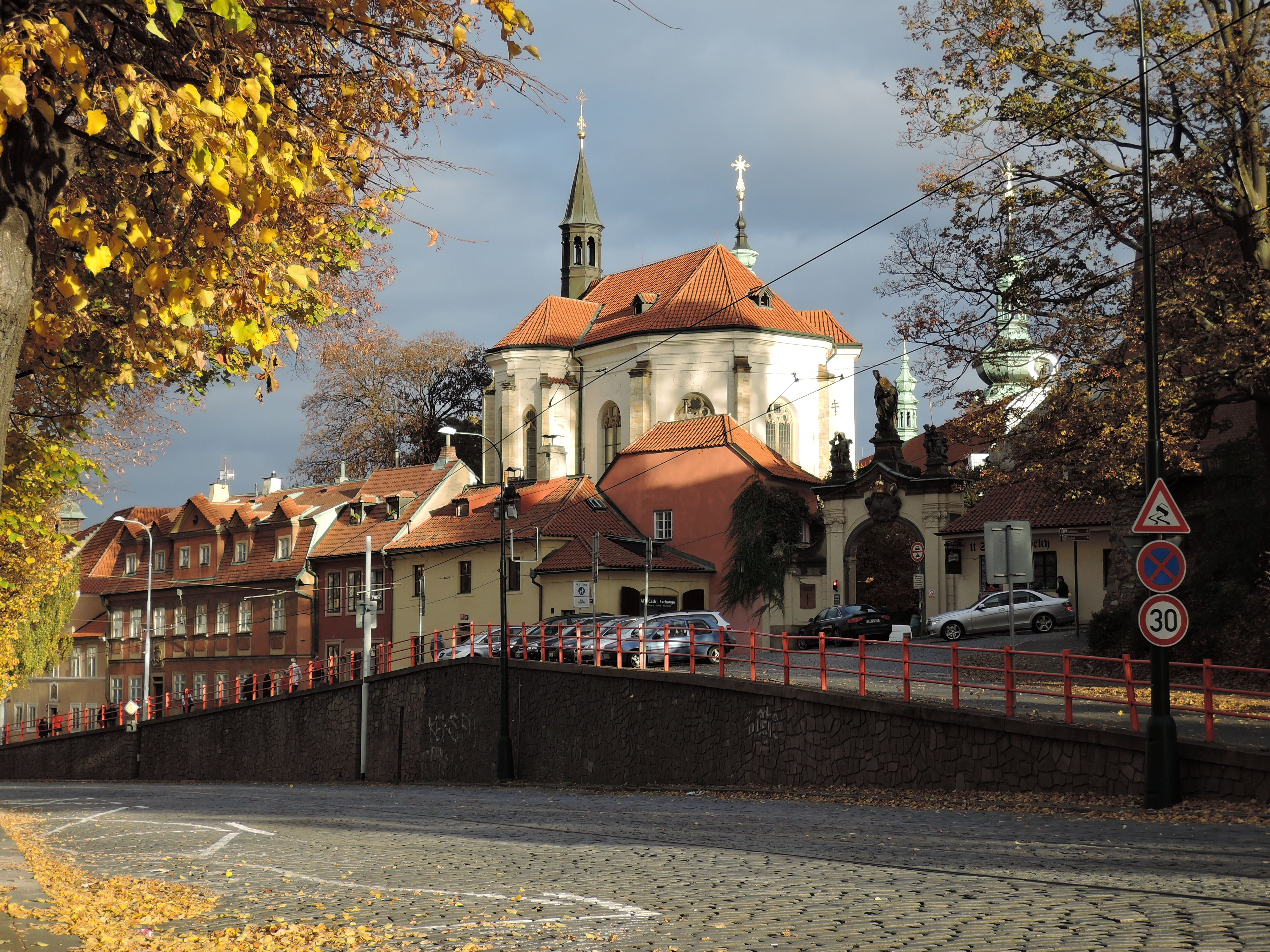 Praha, Hradčany, ulice Dlabačov, v pozadí kostel sv. Rocha